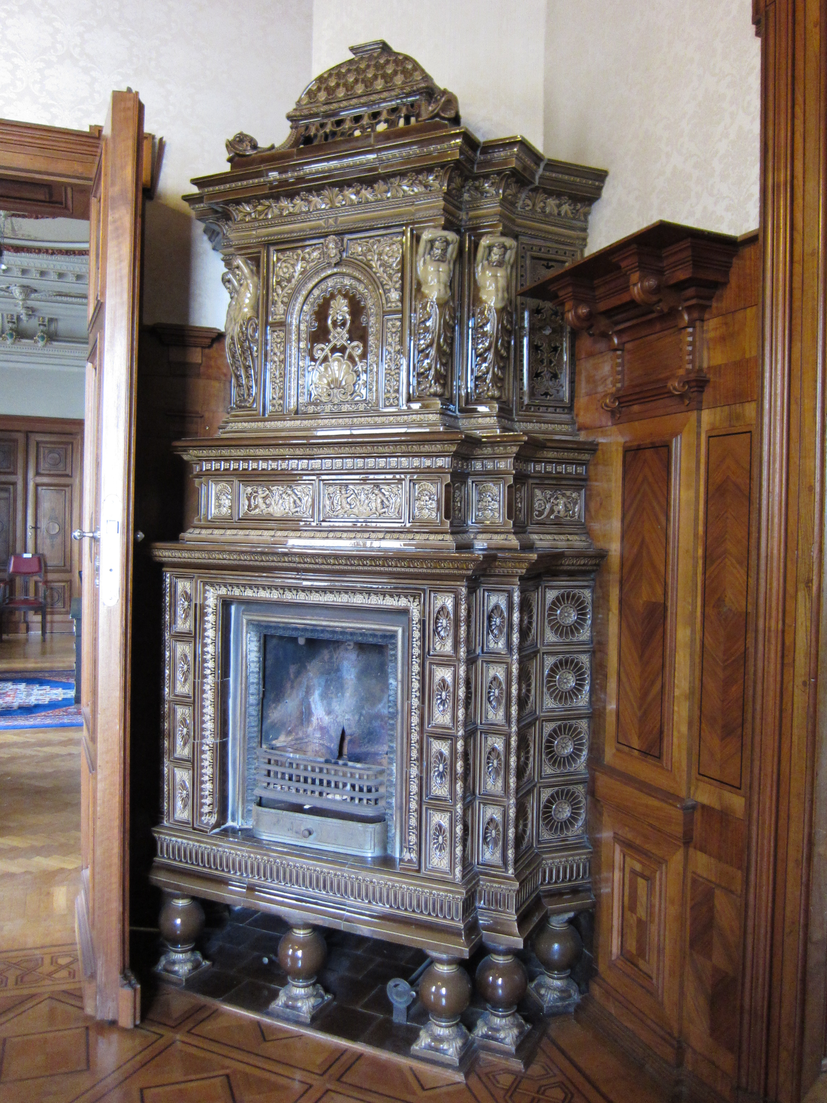 Kachelofen aus der Erbauungszeit (1888) im EG Raum 2 in der Grumbtschen Villa in Dresden, Leipziger Vorstadt